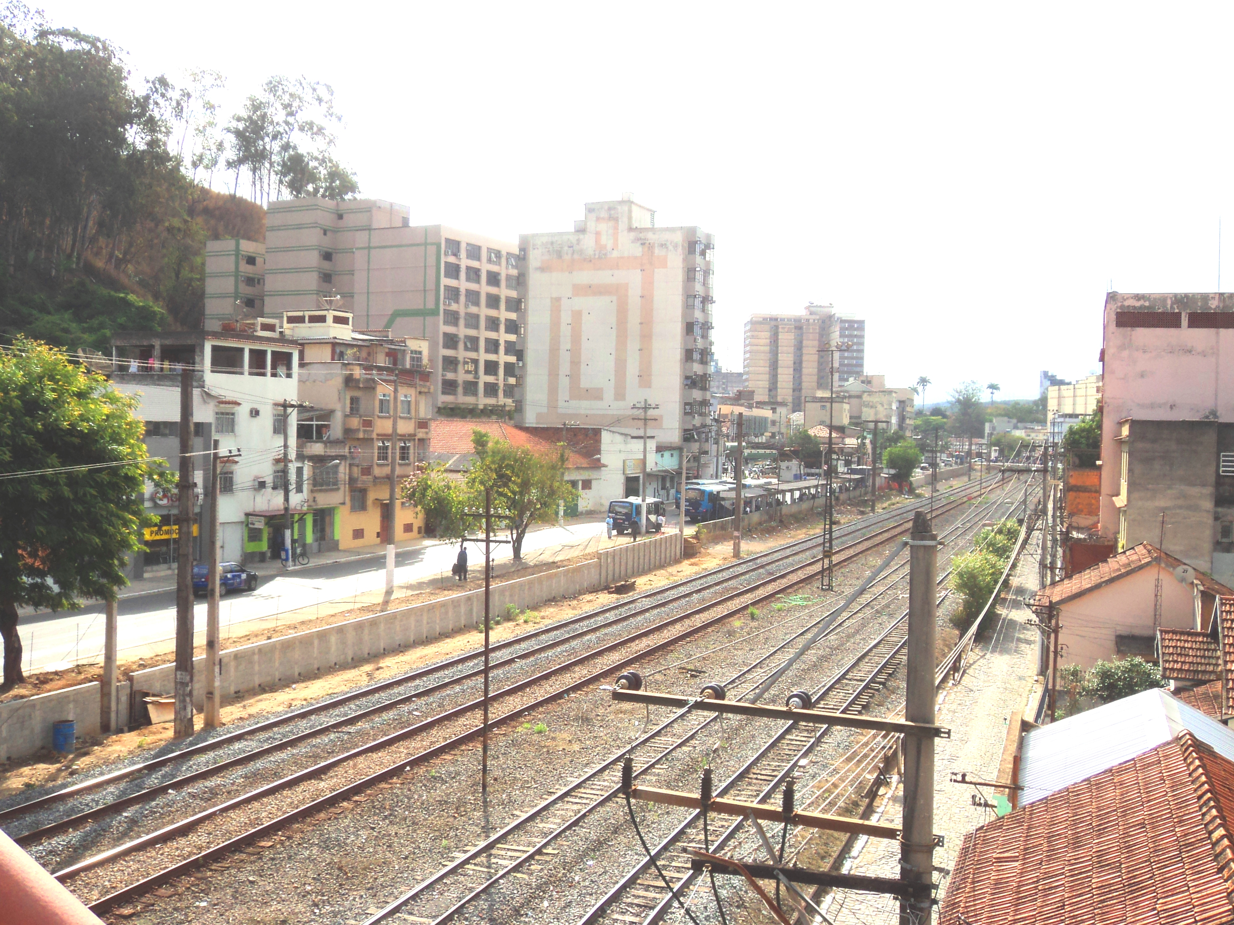 Entroncamento ferroviário em Barra Mansa, estado do Rio de Janeiro, Brasil.